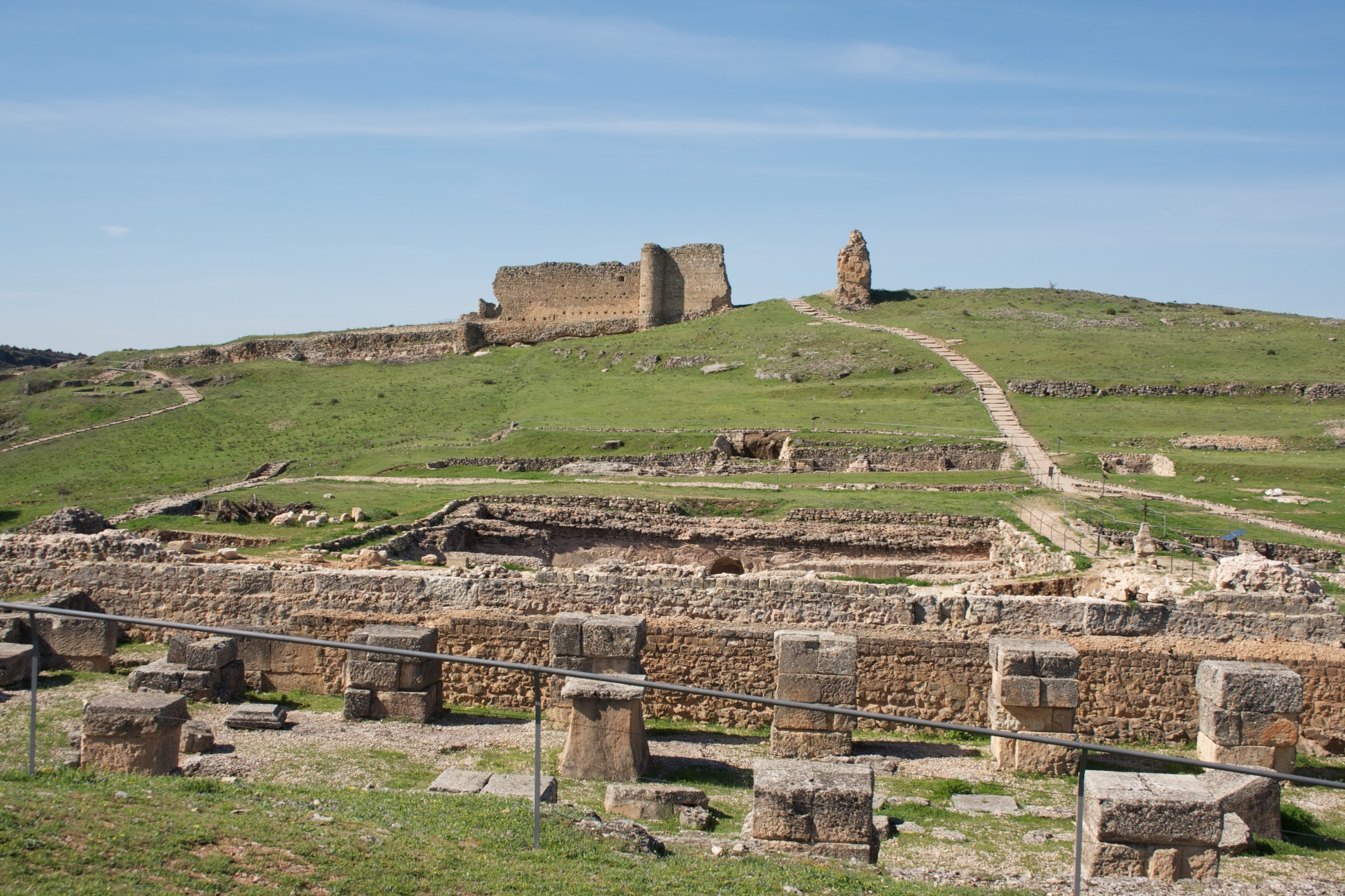 Resto de Valeria, ciudad romana (Cuenca)